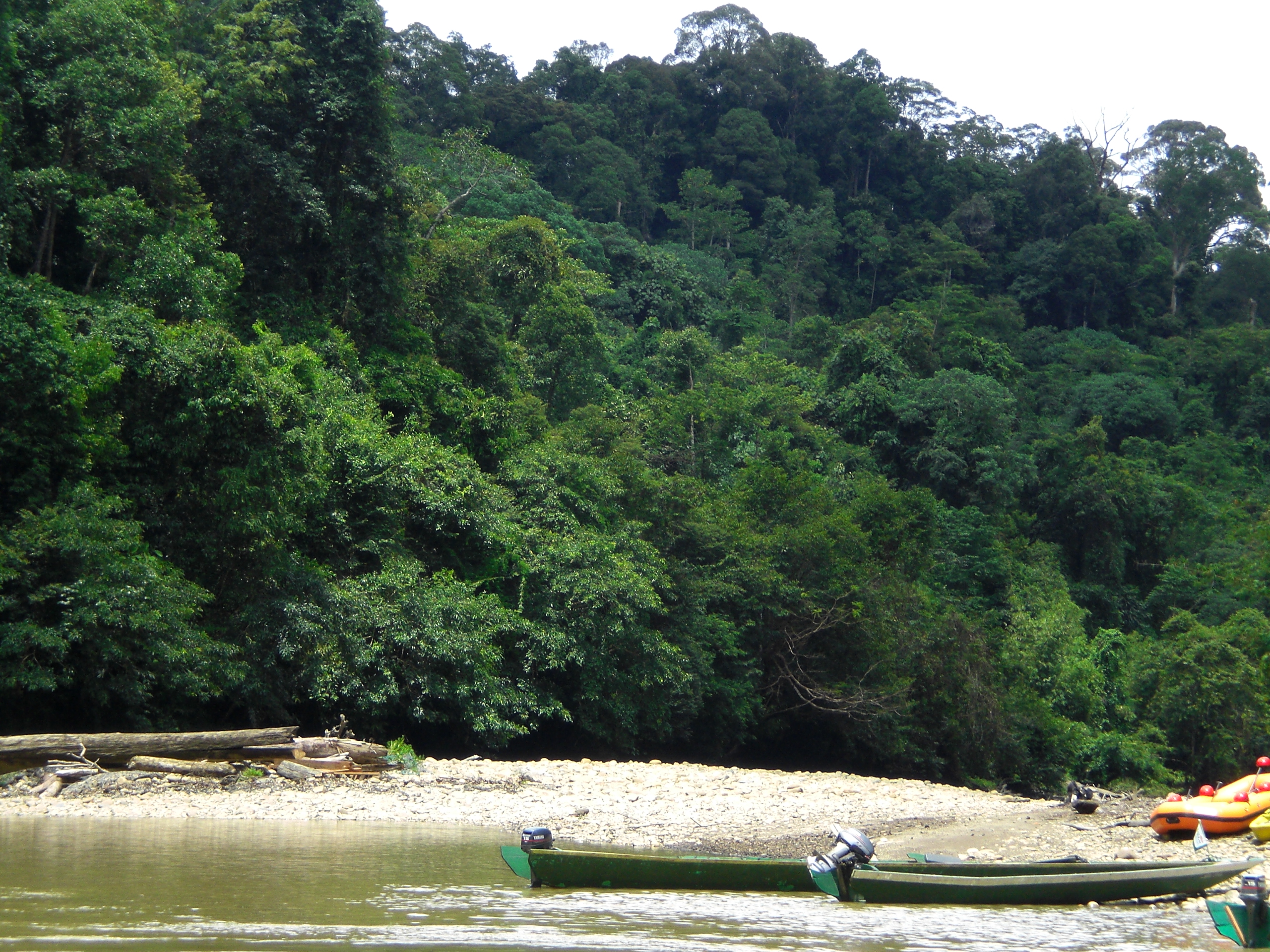 Ulu-Temburong in Brunei